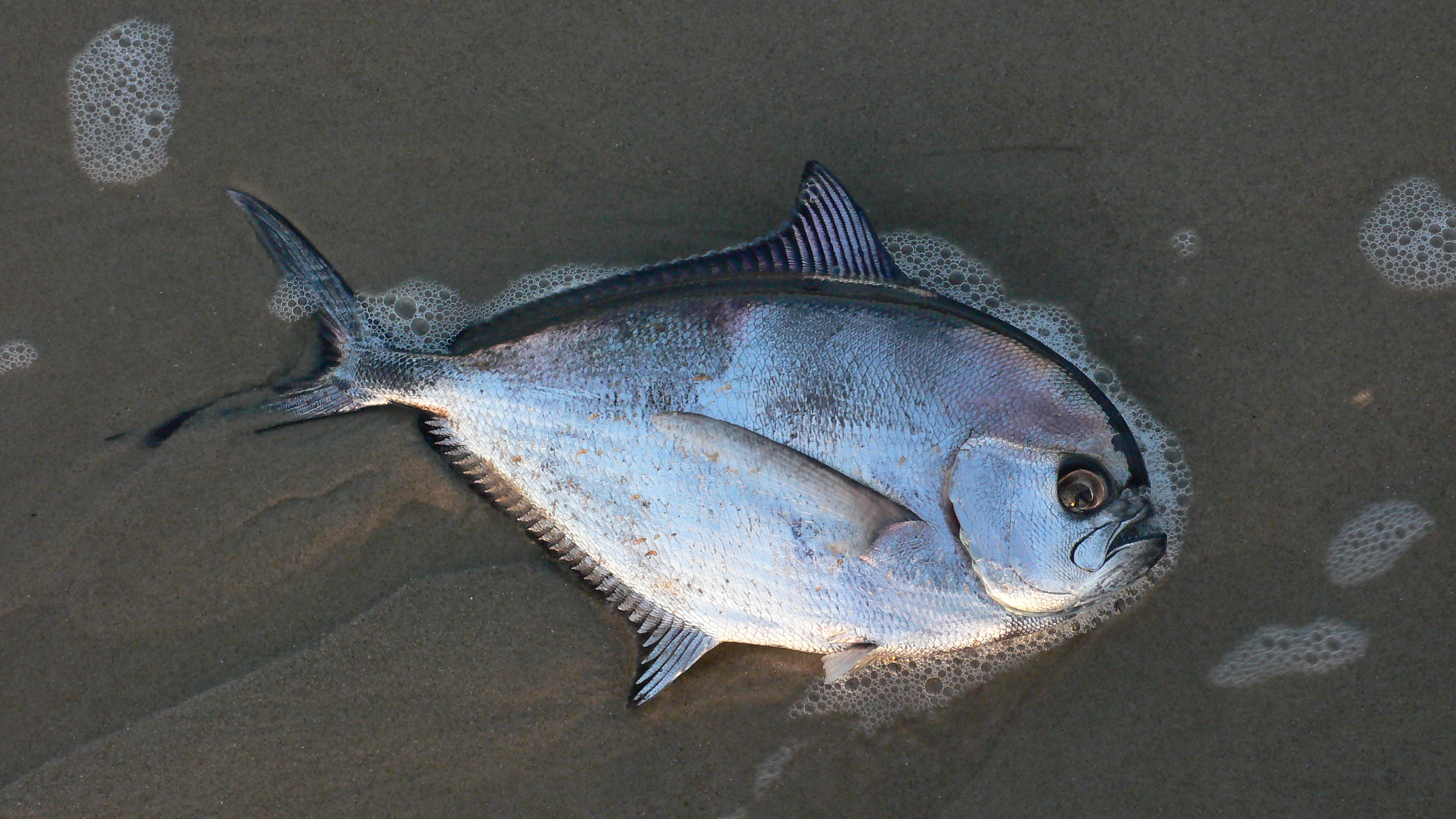 Mehrere dieser Fische lagen am 22.12.2008 lebend am Strand von Callantsoog in Nord Holland. Der abgebildete Fisch war 52cm lang.